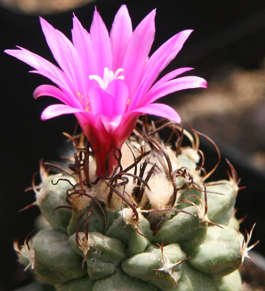 Turbinicarpus alonsoi in Blüte